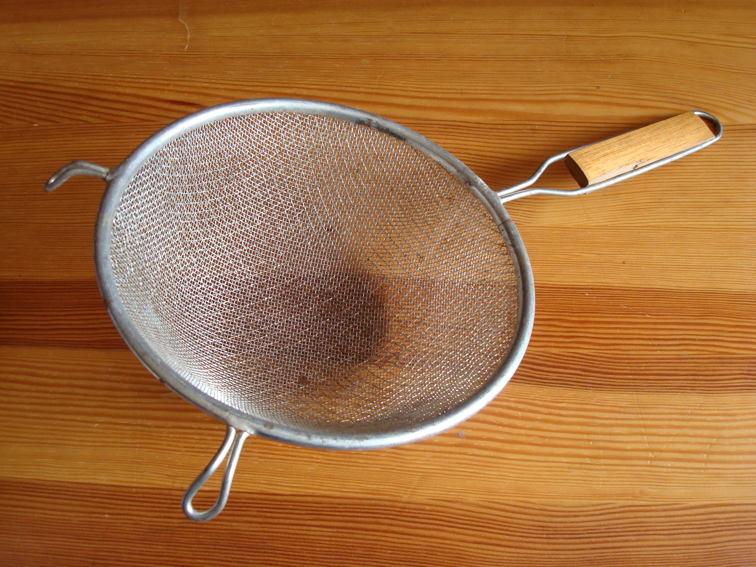 Passoire en fin treillis métallique, de forme hémisphérique